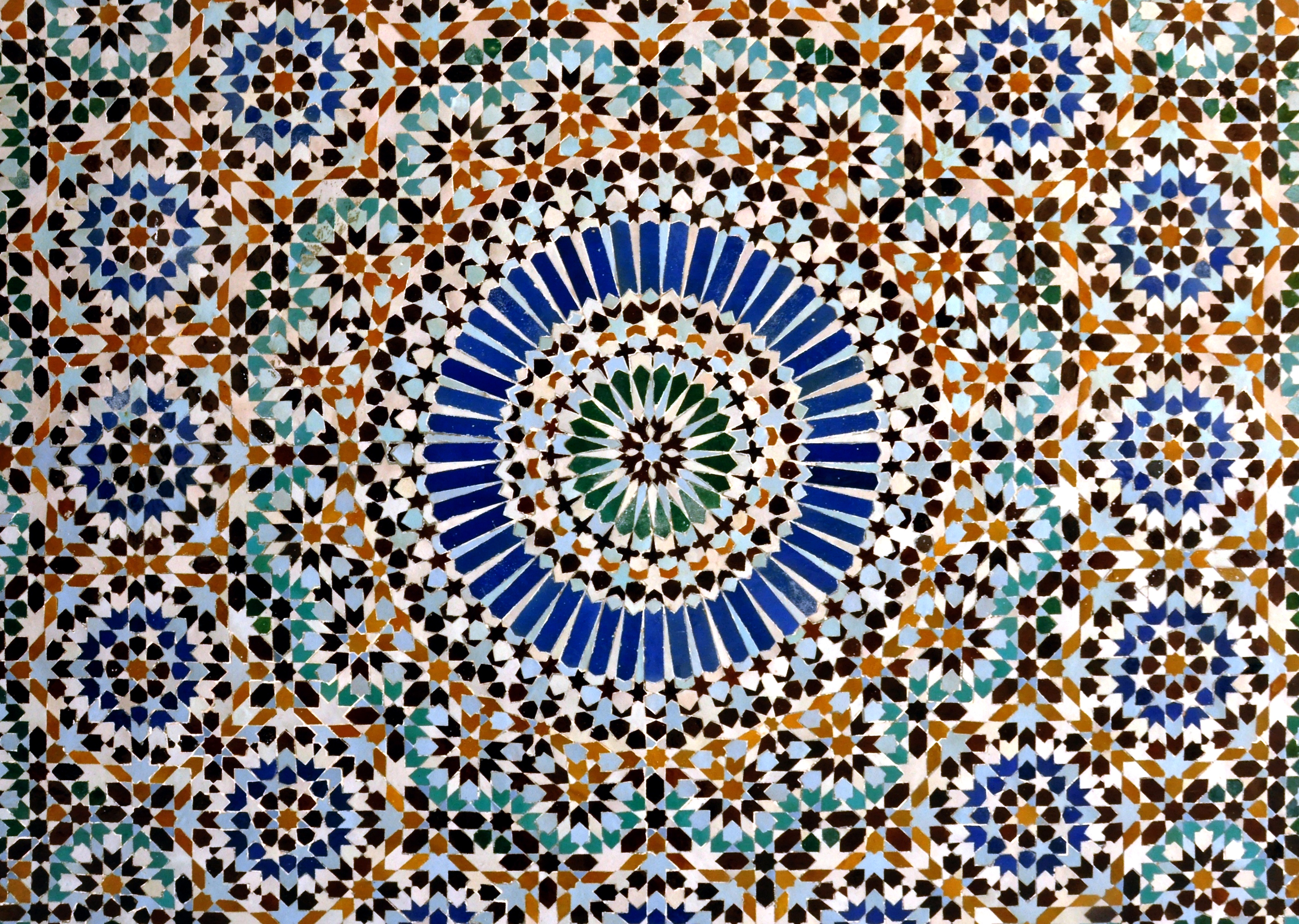 Mosquée de Paris.